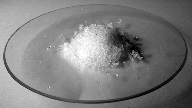 Al(NO3)3